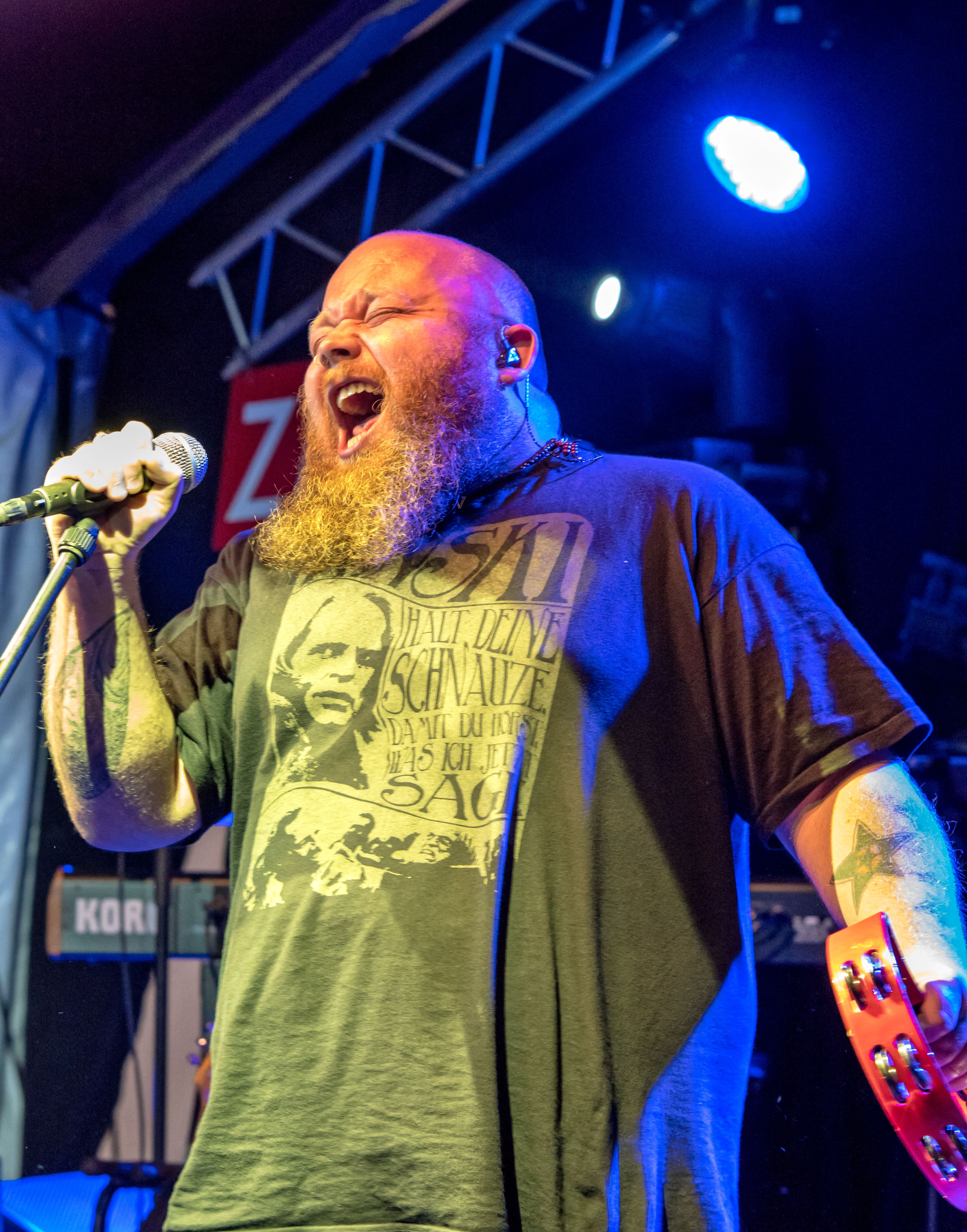 Bilder vom Zelt Musik Festival 2016 in Freiburg im Breisgau Andreas Kümmert